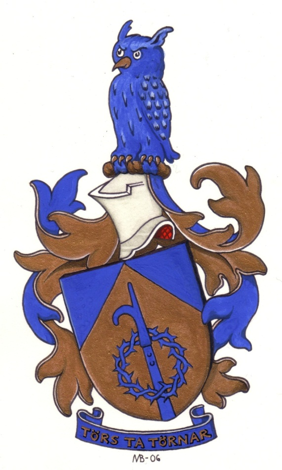 Släktskölden för Halling, släkt från Hallingeberg, Västervik, Kalmar län.